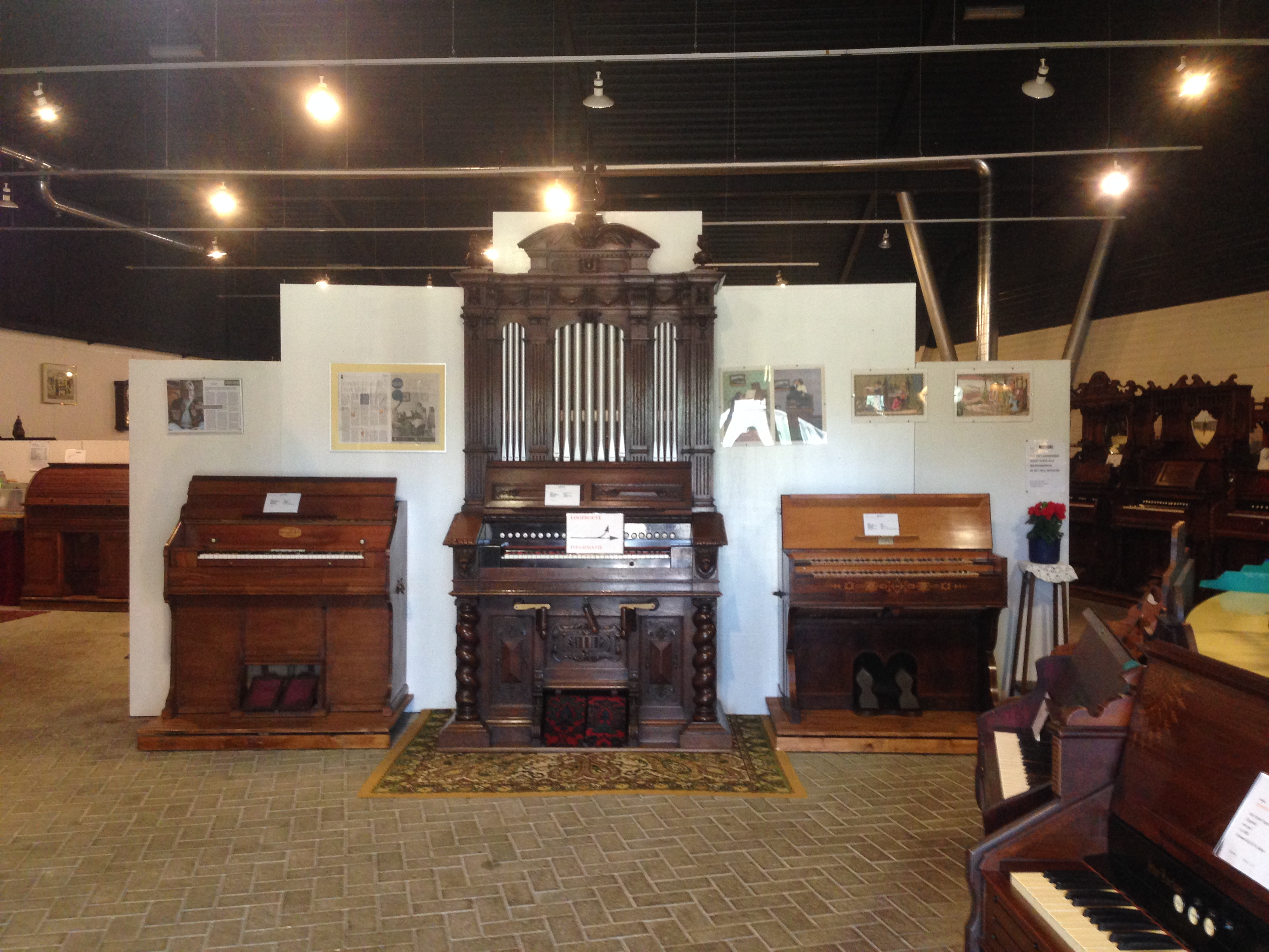 Harmonium Museum Nederland, Veenpark, Barger-Compascuum, Netherlands